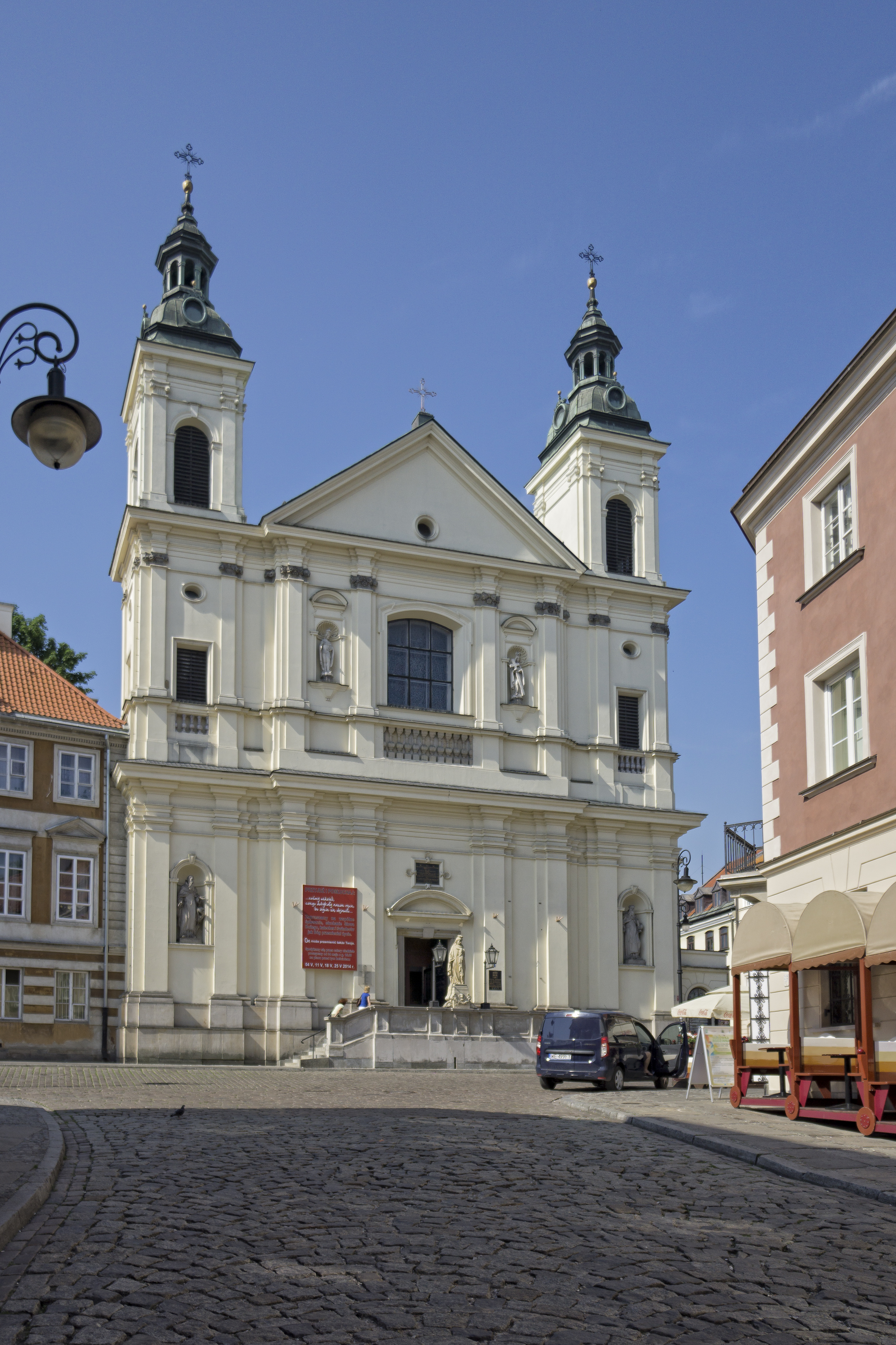 Kościół św. Ducha w Warszawie. Widok z ulicy Mostowej